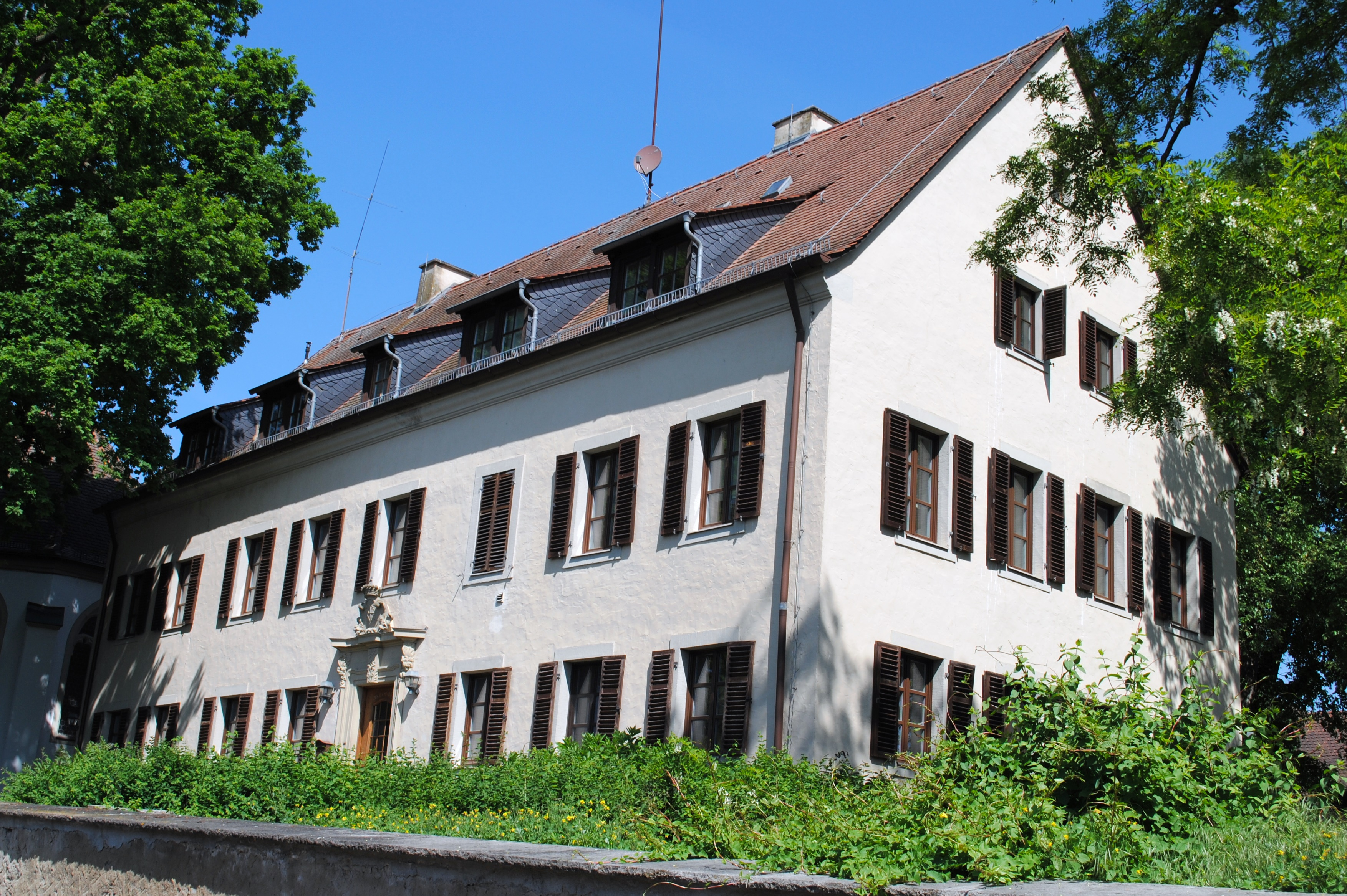 Schloss Schwarzenau (auch Neues Schloss), Schwarzenau (Schwarzach am Main)